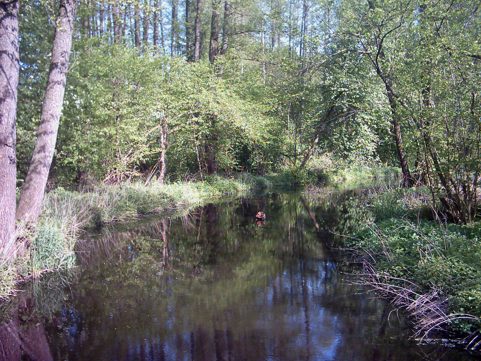 Leśna Prawa okolice Sacharewa (Puszcza Białowieska)